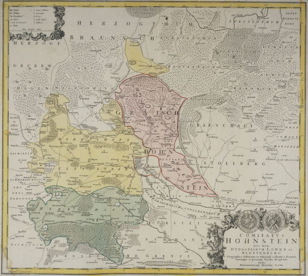 Altkolorierter Kupferstich bei Homann Erben in Nürnberg